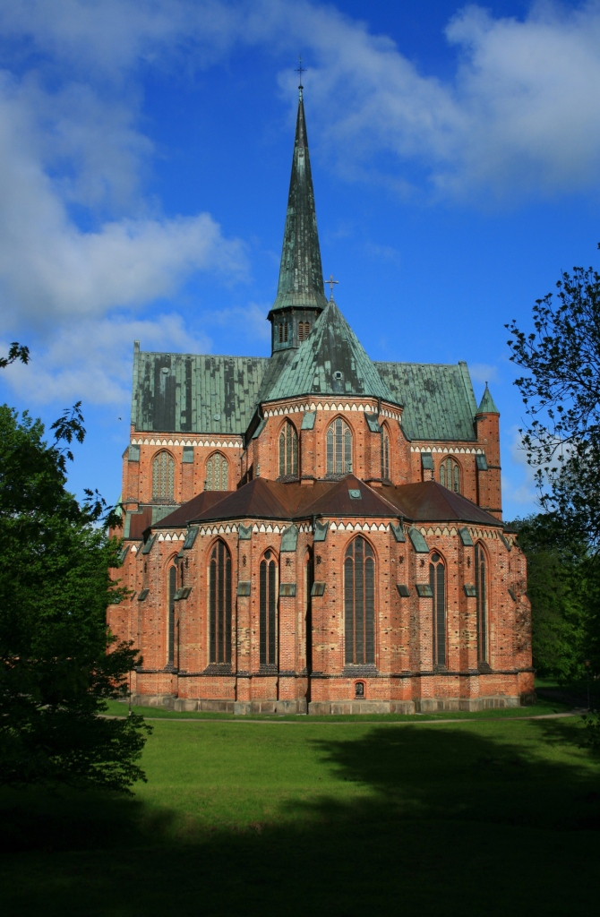 Doberaner Münster von Osten